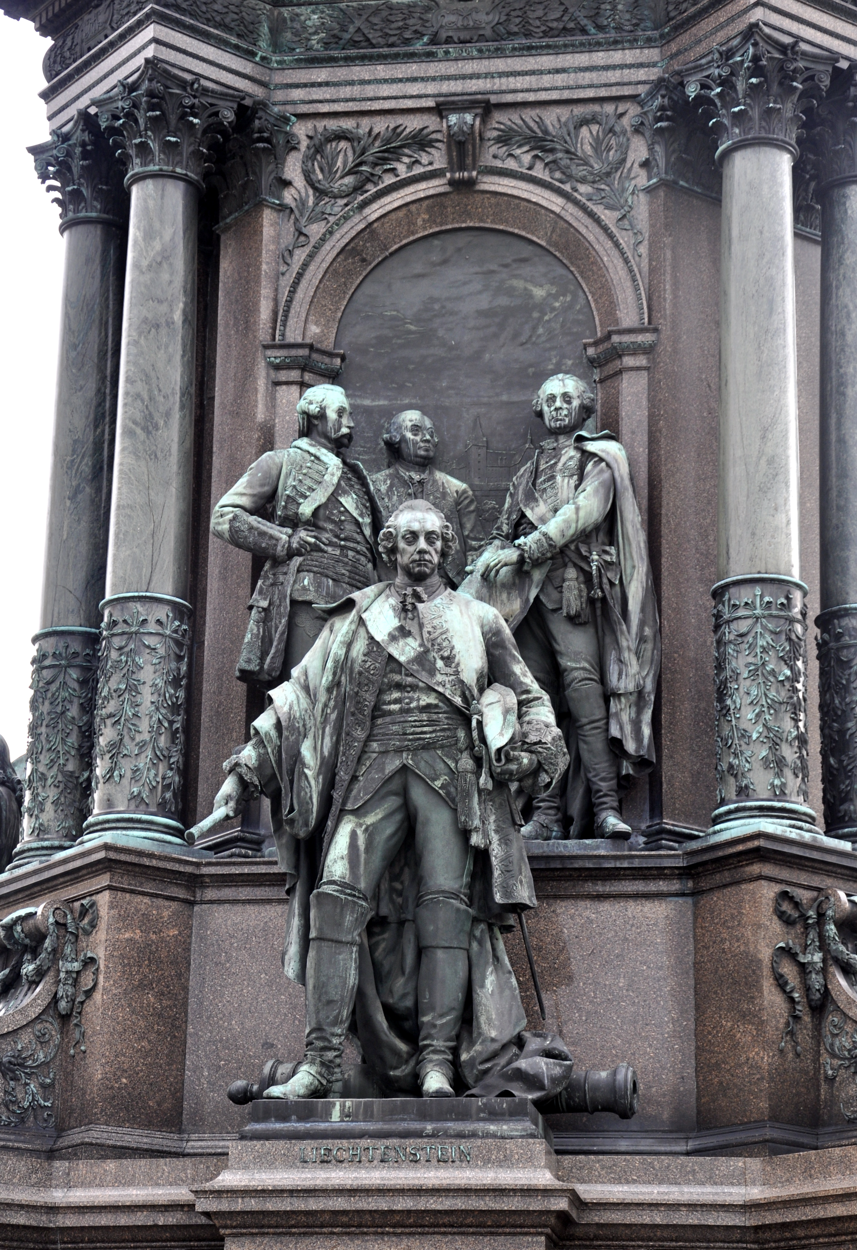 Wien, Maria-Theresien-Platz, Maria-Theresien-Denkmal von Kaspar von Zumbusch (1874–1888), Josef Wenzel von Liechtenstein